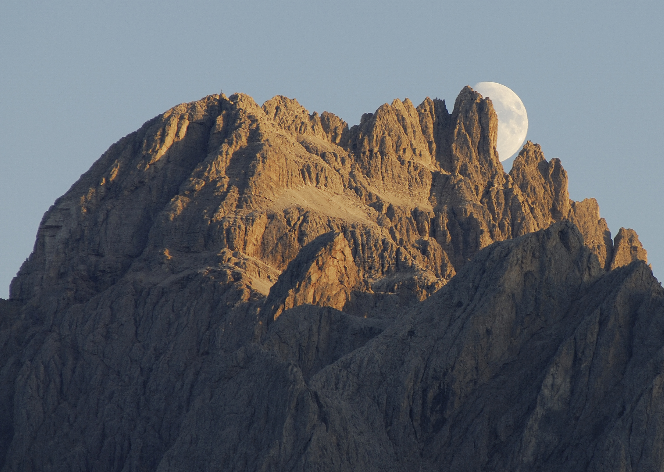 La cupola sommitale della Croda Rossa di Sesto